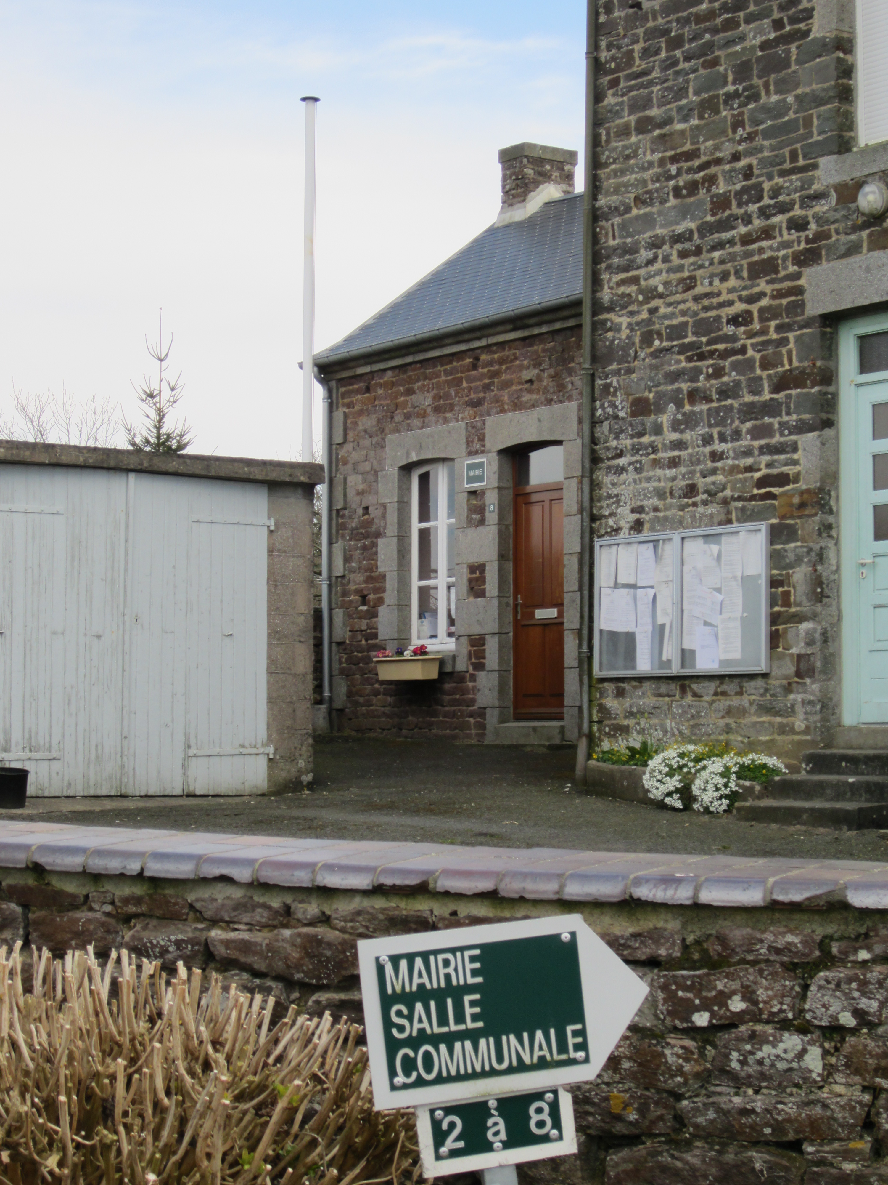 Le Mesnil-Rogues, MAnche